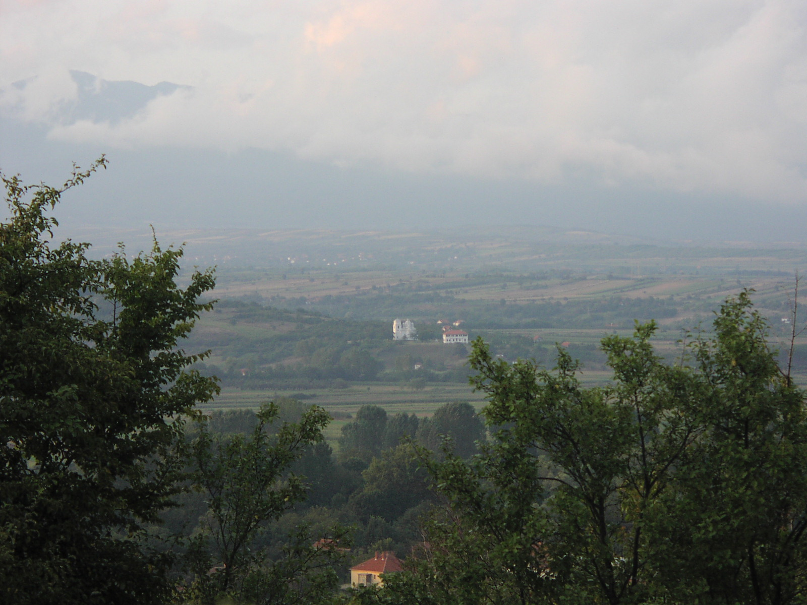 Selo Kondzelj sa crkvom. Slika je slikana sa brda u selu Gojinovac. U pozadini se vidi planina Jastrebac. U podnozju su kuce u selu Gojinovac. Izmedju tih sela protice reka Toplica.